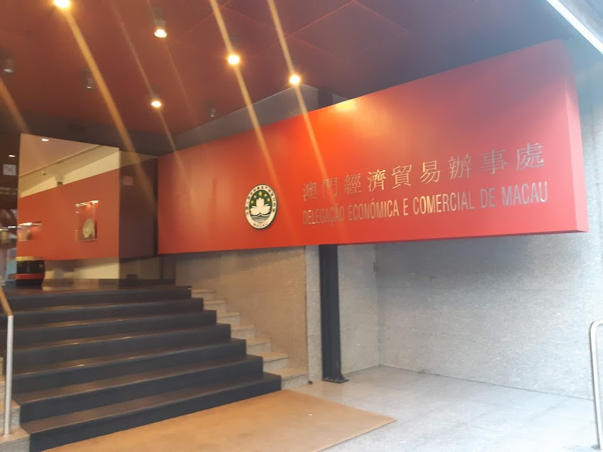 Kinoannonce von einer Wiederaufführung, 50er oder 60er Jahre